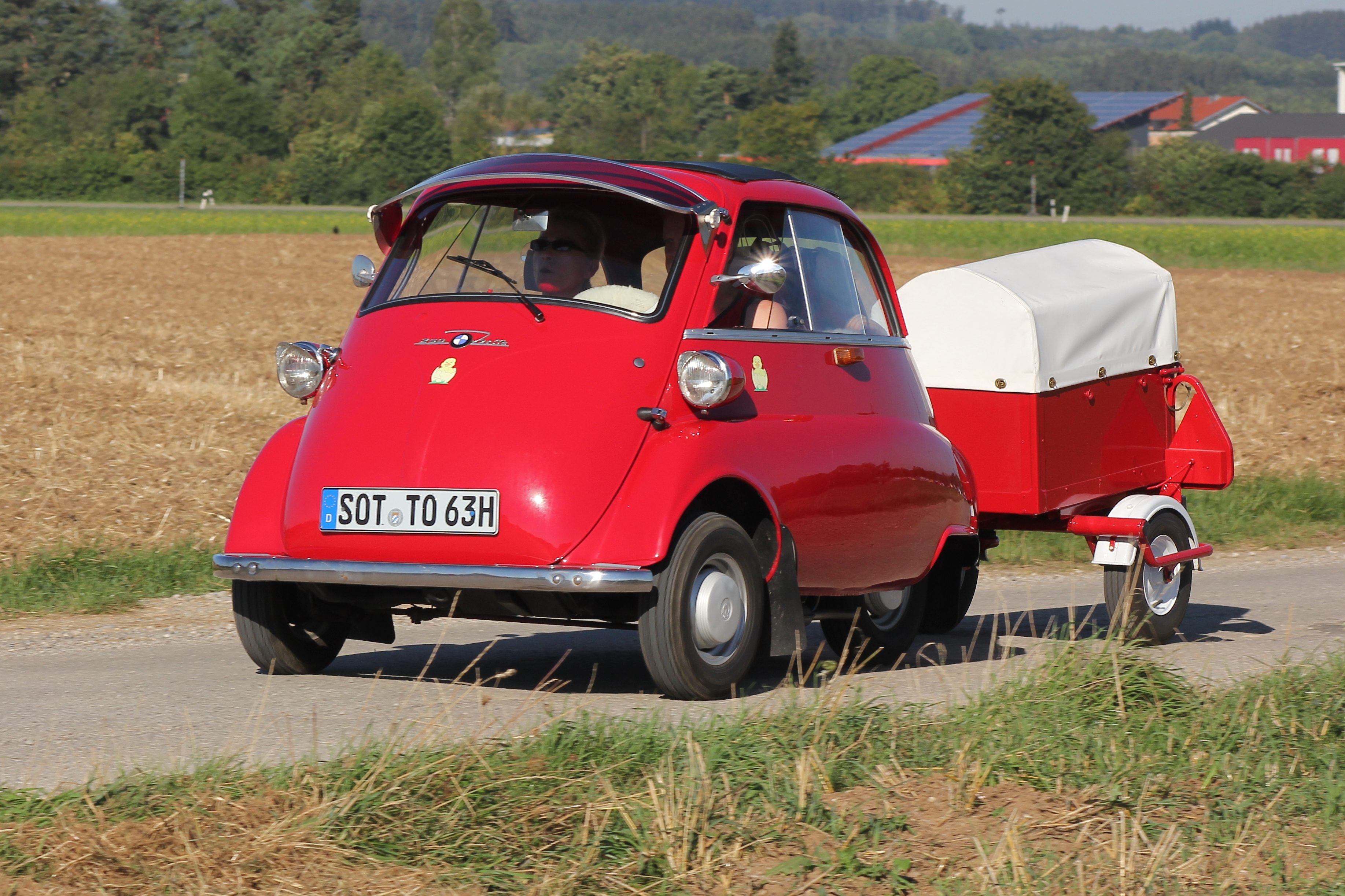 BMW Isetta 250, Baujahr 1963, mit Gepäckanhänger beim Isetta-Treffen in Bad Wörishofen. Sonnenblende und Schirme an den Scheinwerfern nicht serienmäßig. (Kennzeichen des Fahrzeugs verändert)